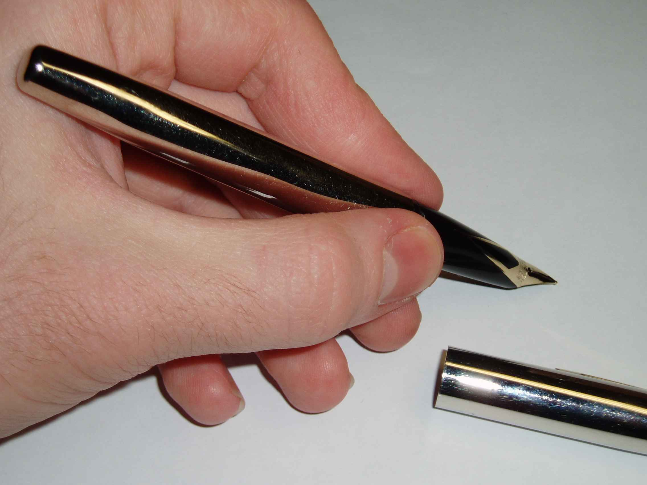 Shaffer Pen